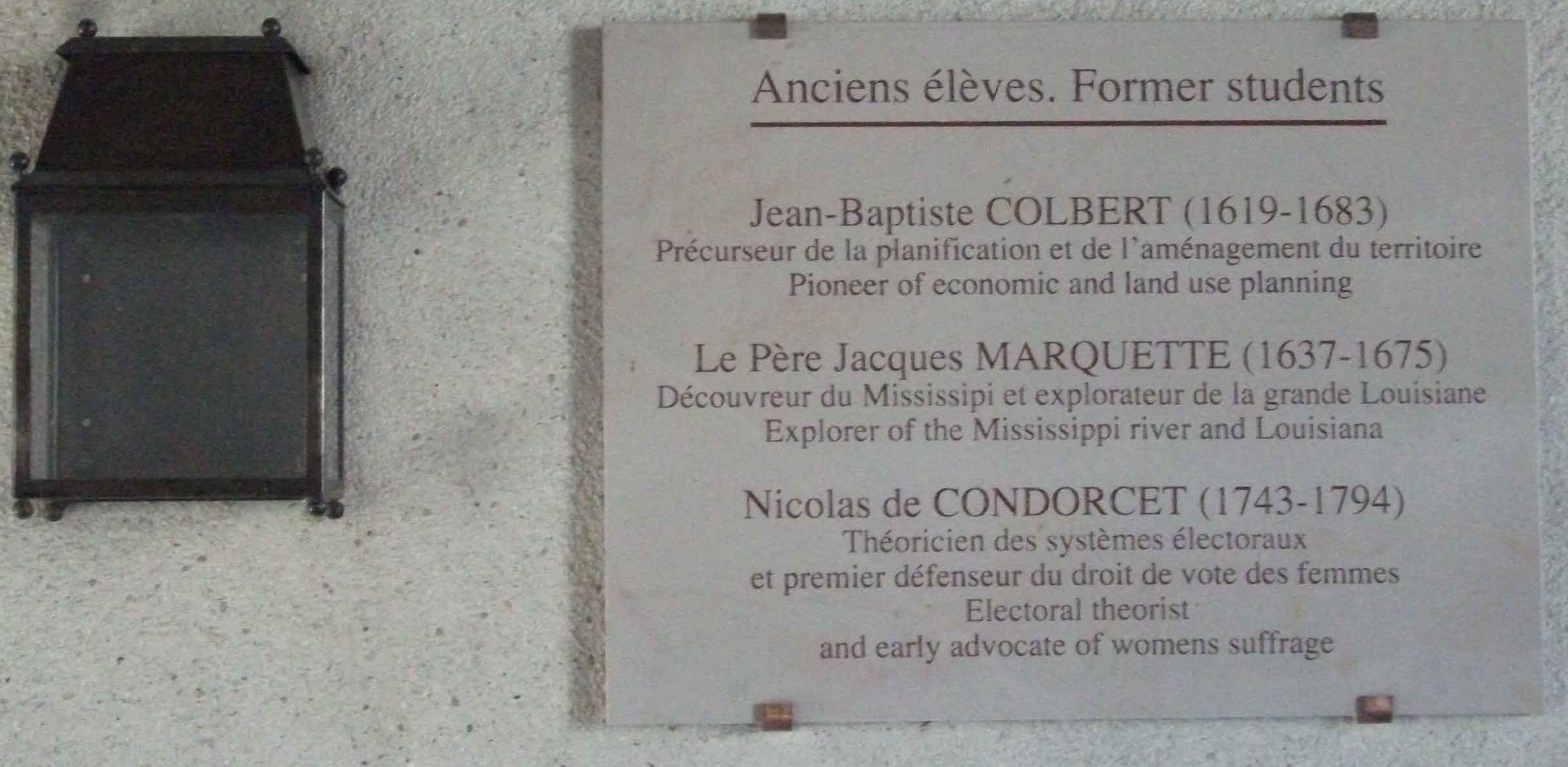 Plaque des Anciens élèves collège des Jésuites.